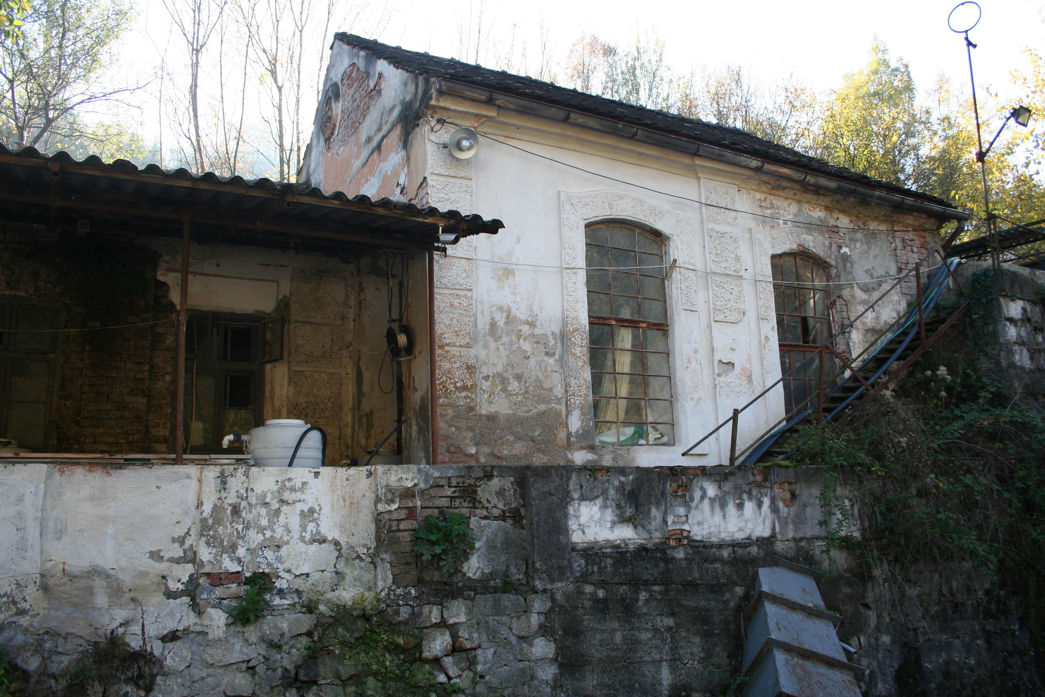 Stara elektrana Valjevo